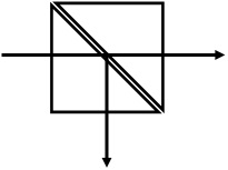 分光鏡簡單示意圖